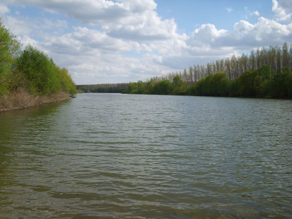 A Duna holtágának látképe Medvénél